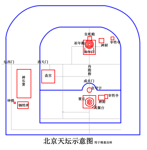 根据《中国大百科全书·文物博物馆卷》“天坛”条目绘制。